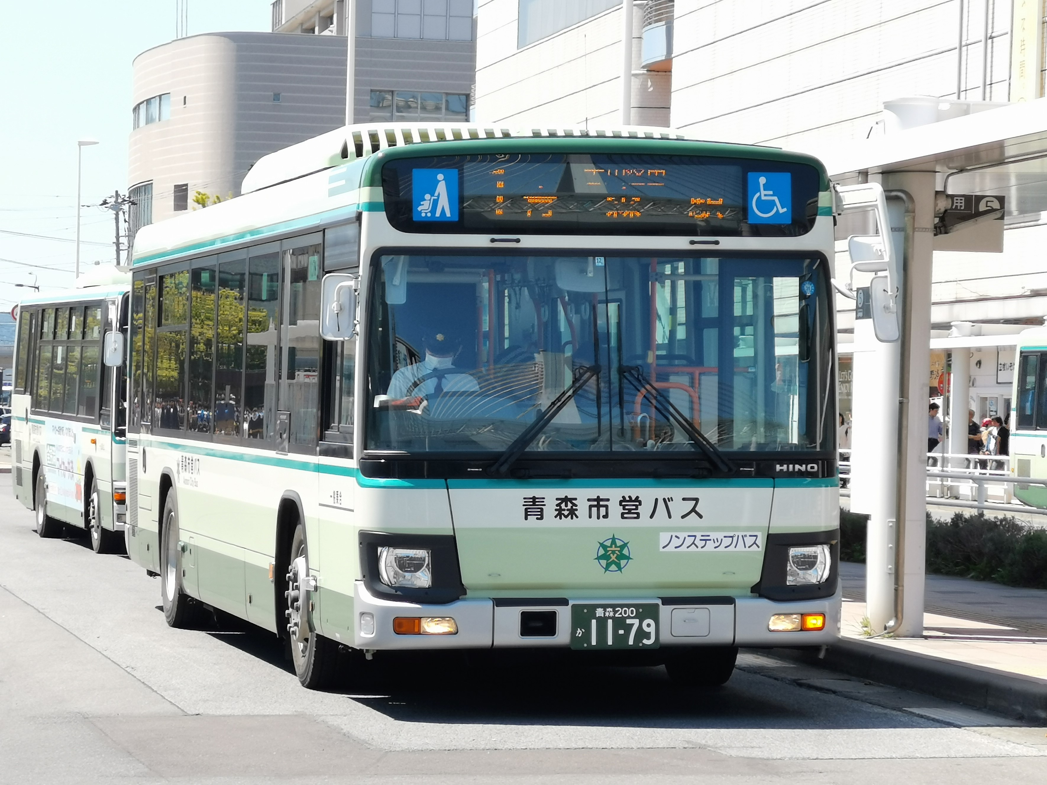 青森駅バス乗り場にて撮影。縦列停車している後方の車両は不明。